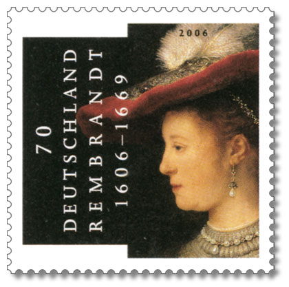 400. Geburtstag Rembrandt, Motiv: Gemäldeausschnitt Saskia van Uylenburgh, Rembrandt Harmenszoon van Rijn Staatliche Museen Kassel, Gemäldegalerie Alte Meister, GK 236